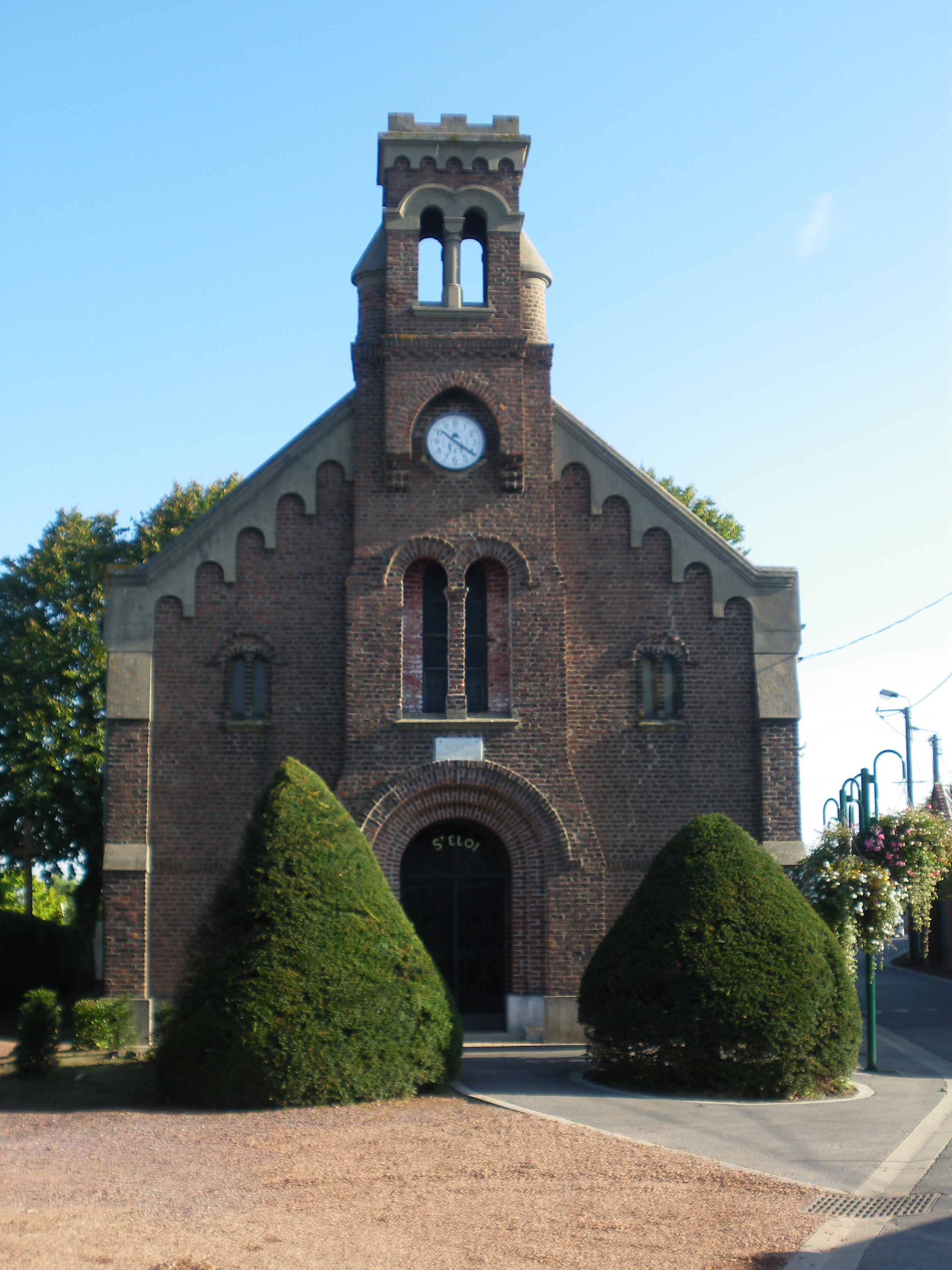 La Chapelle Saint-Eloi de Beuvry, située dans le parc du Quinty, lieu de la fondation de la confrérie des Charitables de Saint-Eloi.